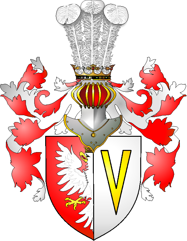 polish CoA Fornalski (Orlica odmienna) / herb Fornalski